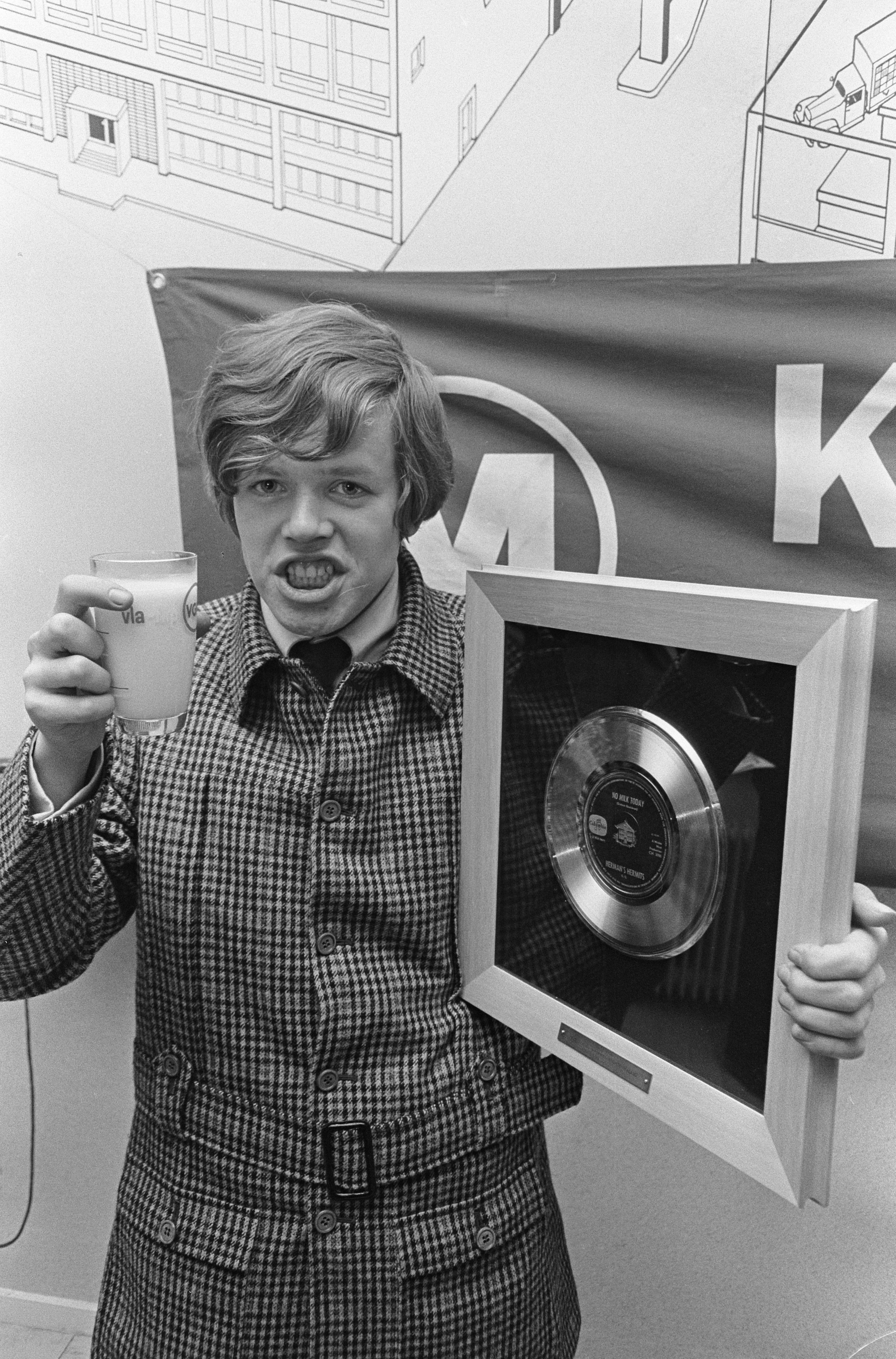 Collectie / Archief : Fotocollectie Anefo Reportage / Serie : [ onbekend ] Beschrijving : Herman van de beatgroep Hermans Hermits kreeg gouden plaat voor No Milk Today Annotatie : Zanger Herman (echte naam: Peter Noone) te gast in een melkfabriek te Hilversum aan de Larenseweg Datum : 16 december 1966 Locatie : Hilversum Trefwoorden : beatgroepen, musici, popmuziek Fotograaf : Nijs, Jac. de / Anefo Auteursrechthebbende : Nationaal Archief Materiaalsoort : Negatief (zwart/wit) Nummer archiefinventaris : bekijk toegang 2.24.01.05 Bestanddeelnummer : 919-8895 Reacties Geplaatst door Maaike op 27 augustus 2012 - 22:01. Herman's Hermits. Zanger Herman (echte naam: Peter Noone)